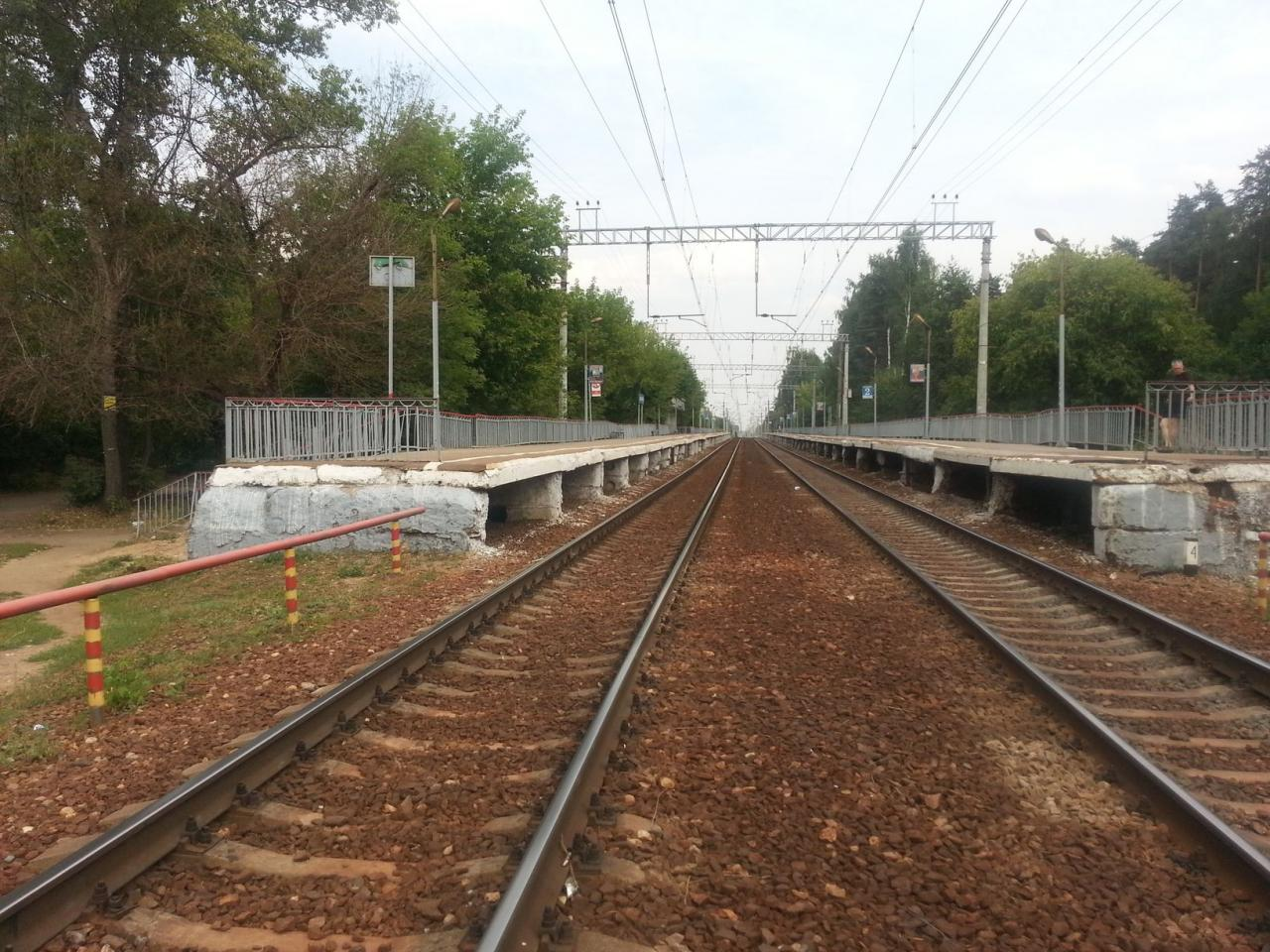 Железнодорожная платформа Валентиновка Ярославского направления МЖД